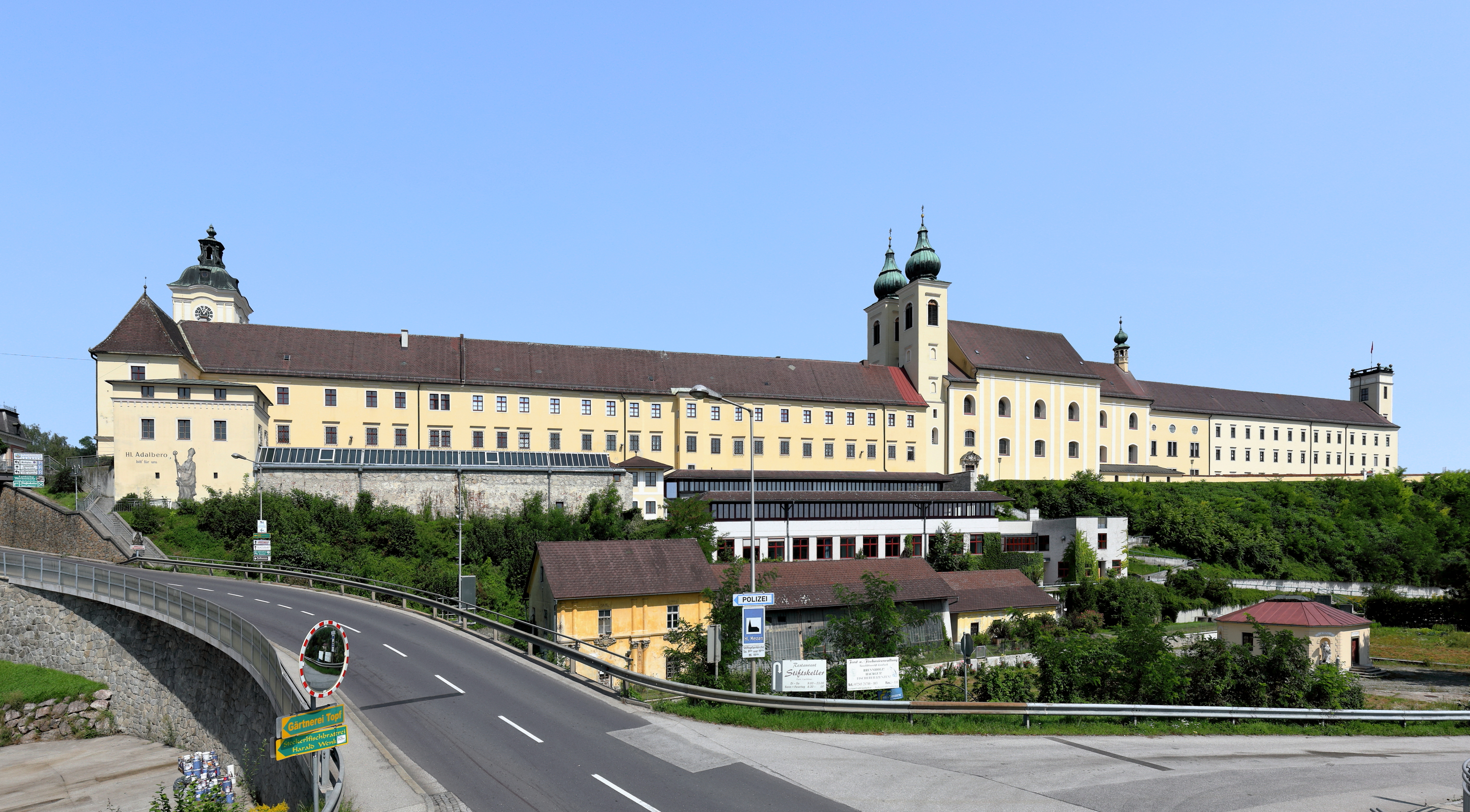 Südwestansicht des Benediktinerstiftes in der oberösterreichischen Marktgemeinde Lambach.Die stattliche langgestreckte Anlage auf einer Bodenwelle neben der Traun hat ihr heutiges Erscheinungsbild weitgehend durch die Bautätigkeit zwischen Mitte des 17. Jahrhunderts und Anfang des 18. Jahrhunderts erhalten. Gegründet wurde das Stift 1046 für weltliche Chorherren und 1056 als Benediktinerabtei. Beim Bayerneinfall 1233 wurde Kloster und Kirche Großteils zerstört.